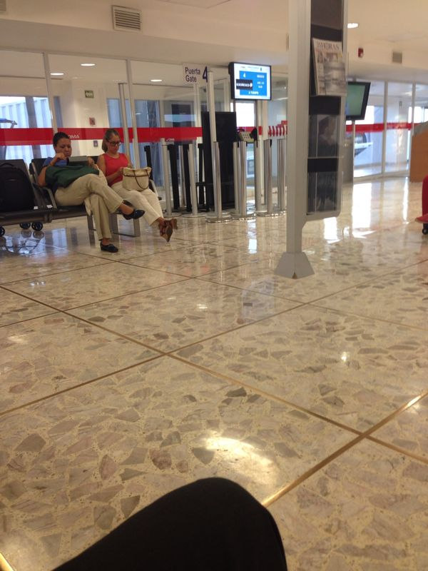 Sala de última espera del aeropuerto de Acapulco